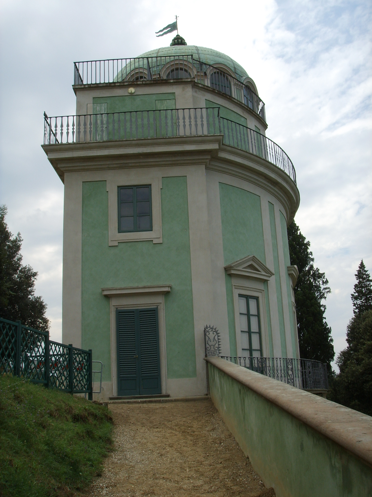 Boboli, kafeehaus